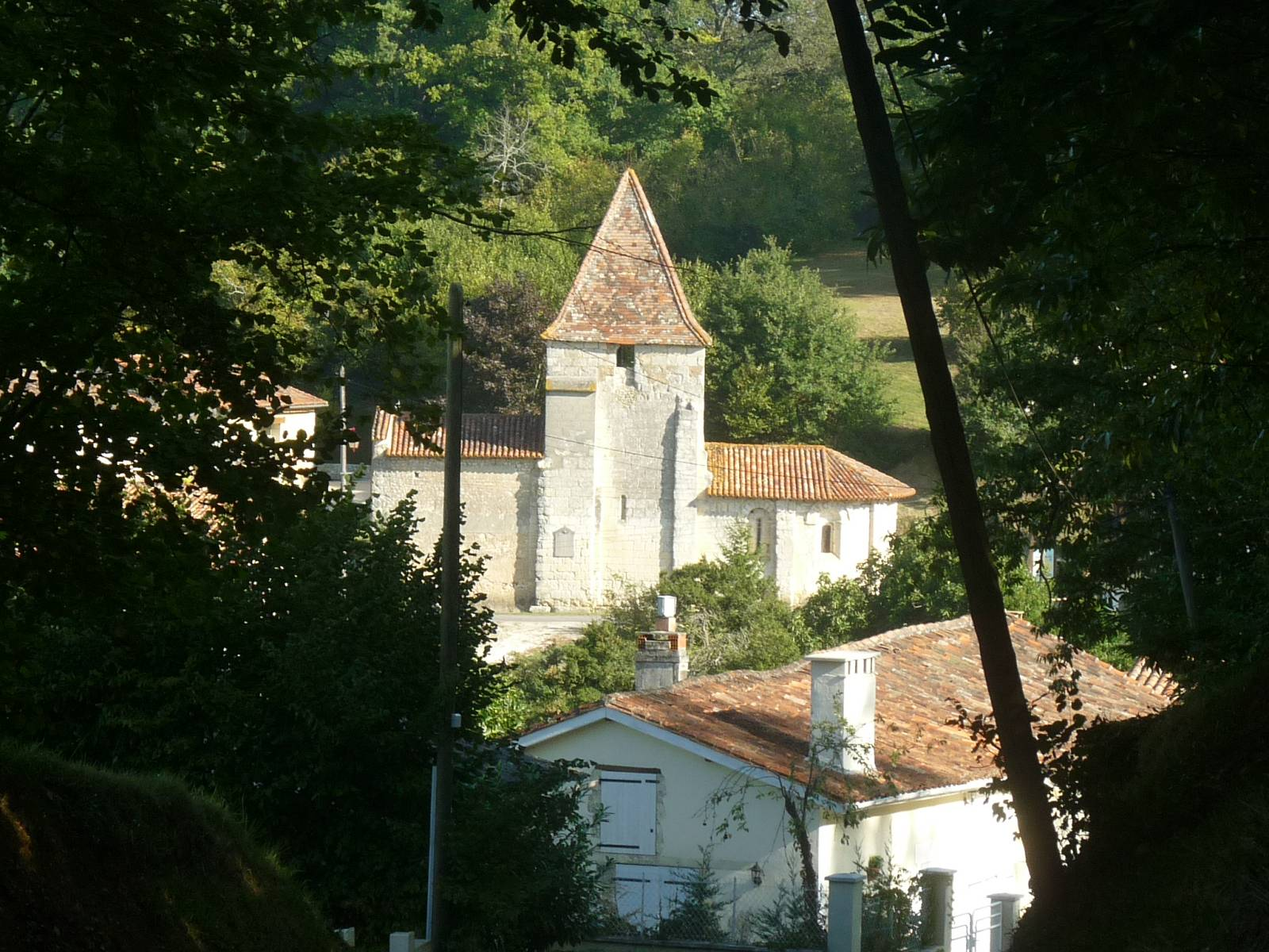 église et village de St-Avit (16), France